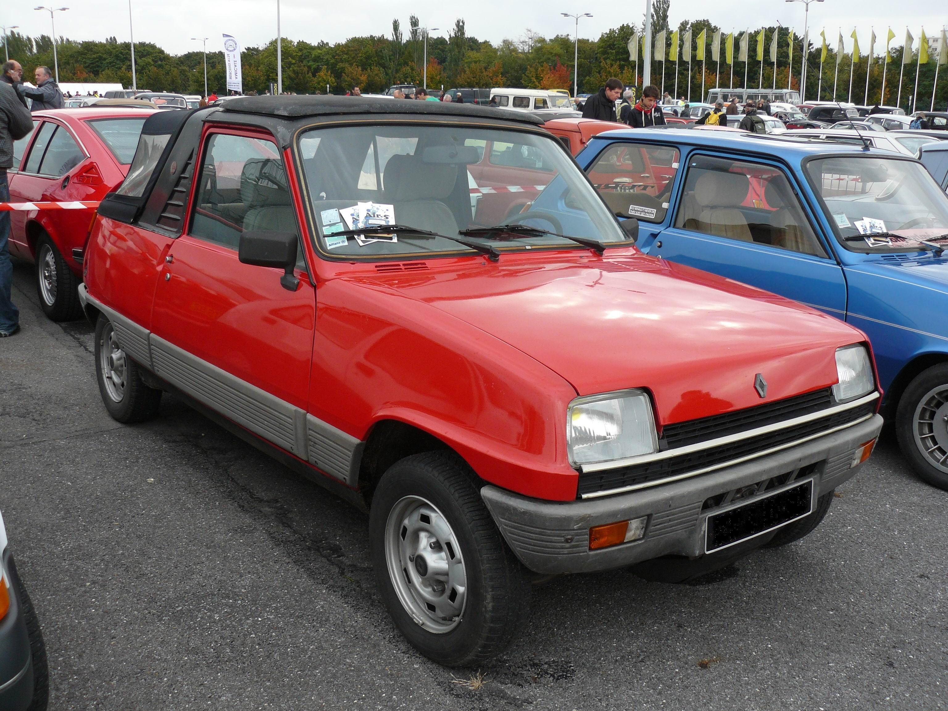 Automedon 2012